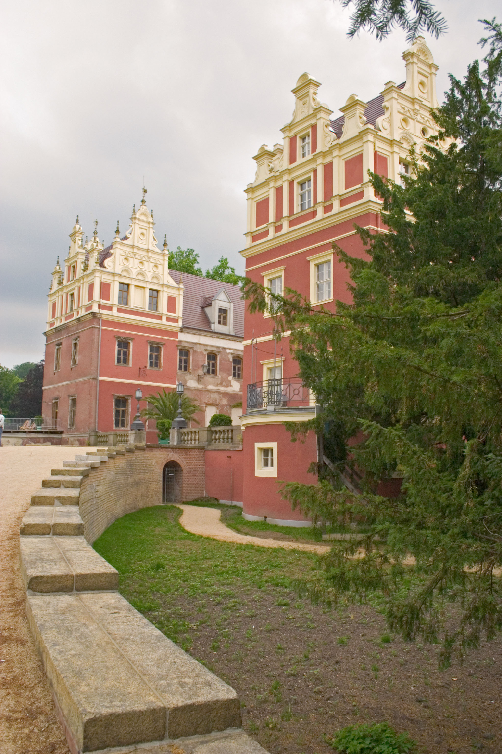 Fürst-Pückler-Park (Park Mużakowski) Author: Adam Kumiszcza